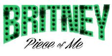 logo tour